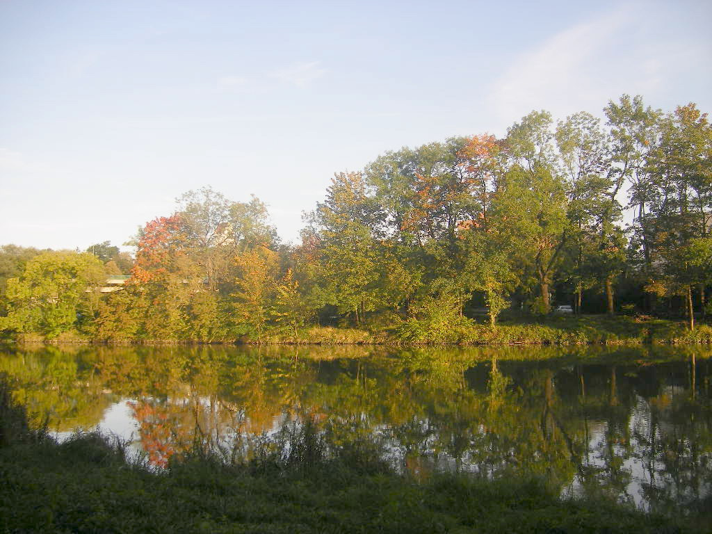 The Danube between Elchingen and Leipheim